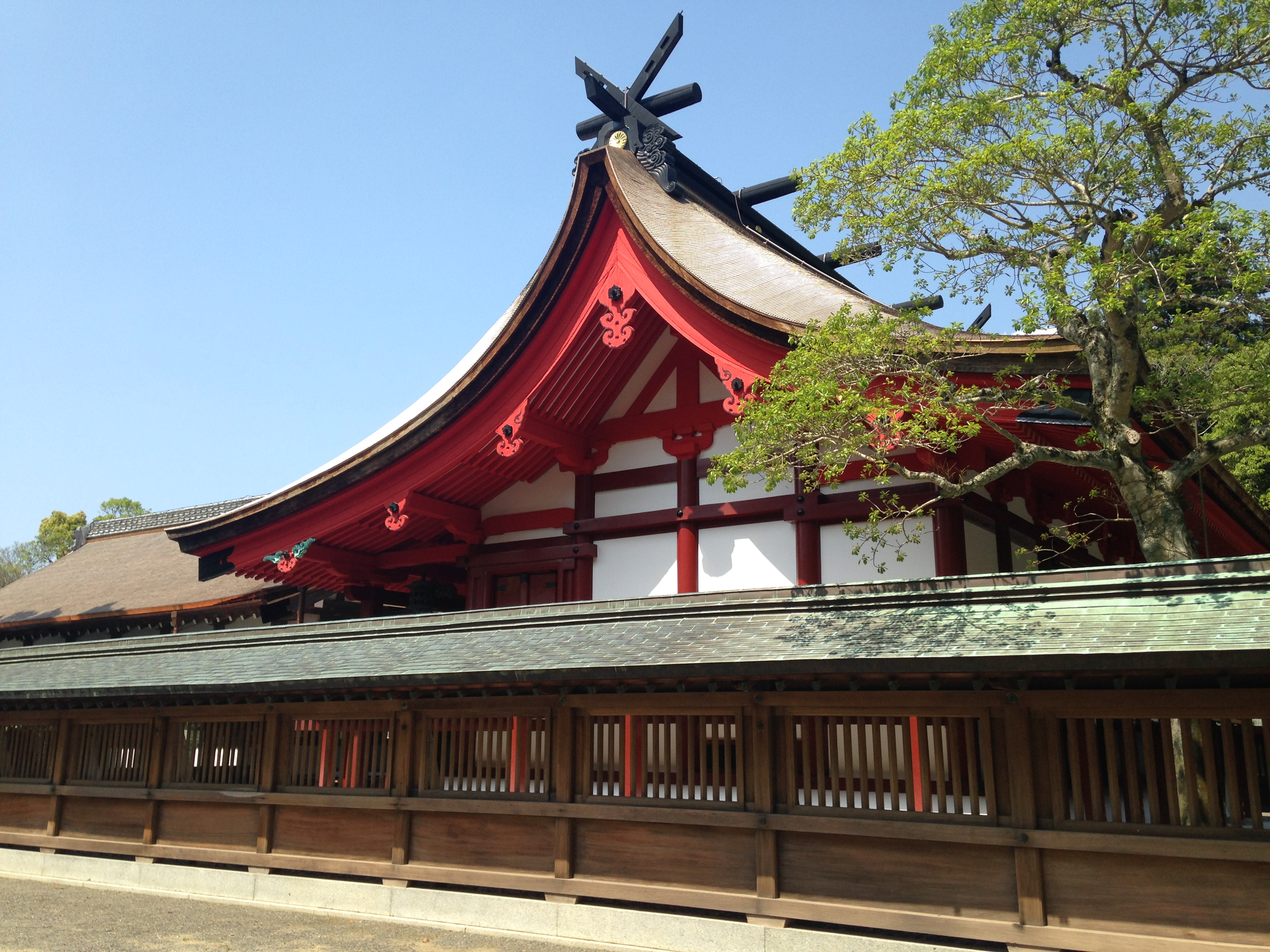 宗像大社(辺津宮)の本殿と拝殿